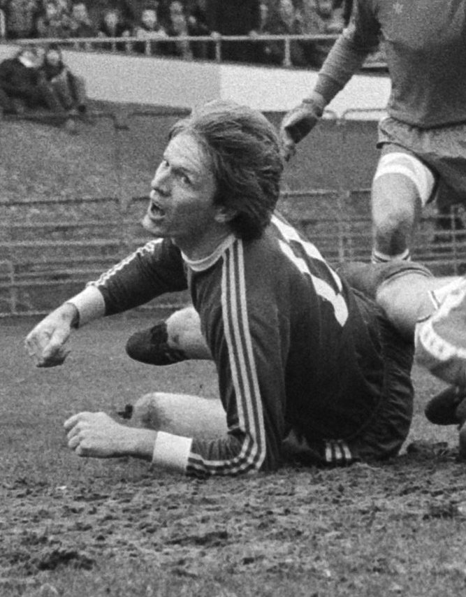 Collectie / Archief : Fotocollectie Anefo Reportage / Serie : Utrecht tegen FC Twente 2-2 Beschrijving : Ab Gritter (liggend) tijdens de wedstrijd FC Utrecht tegen FC Twente Datum : 8 februari 1981 Locatie : Utrecht (provincie), Utrecht (stad) Trefwoorden : ballen, doelpunten, publiek, sport, tribunes, voetbal, voetballers, voetbalvelden, wedstrijden Persoonsnaam : Bos, Jaap, Gritter, Ab, Veen, Leo van Instellingsnaam : FC Twente Fotograaf : Dijk, Hans van / Anefo, [onbekend] Auteursrechthebbende : Nationaal Archief Materiaalsoort : Negatief (zwart/wit) Nummer archiefinventaris : bekijk toegang 2.24.01.05 Bestanddeelnummer : 931-3086